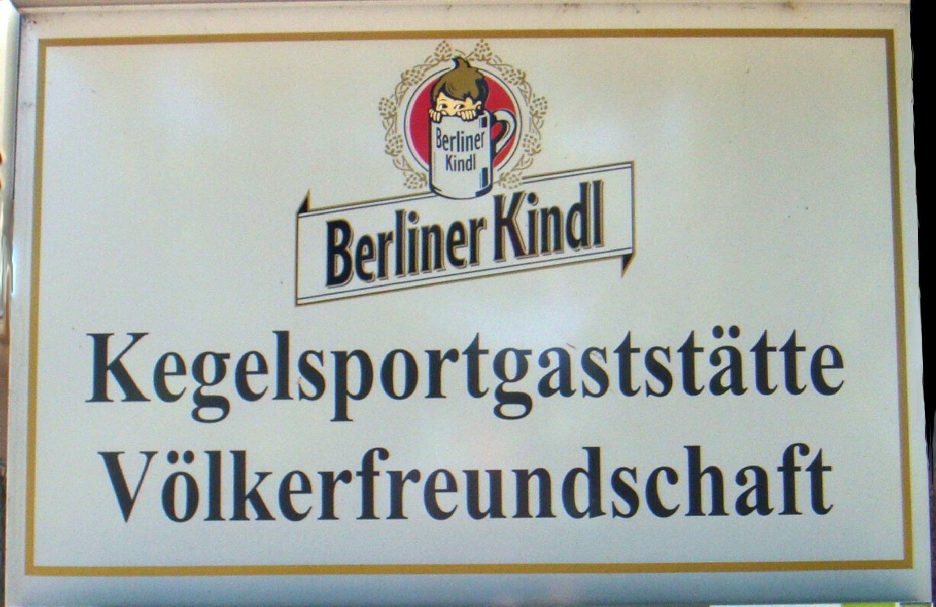 Gaststätte in Schöneweide